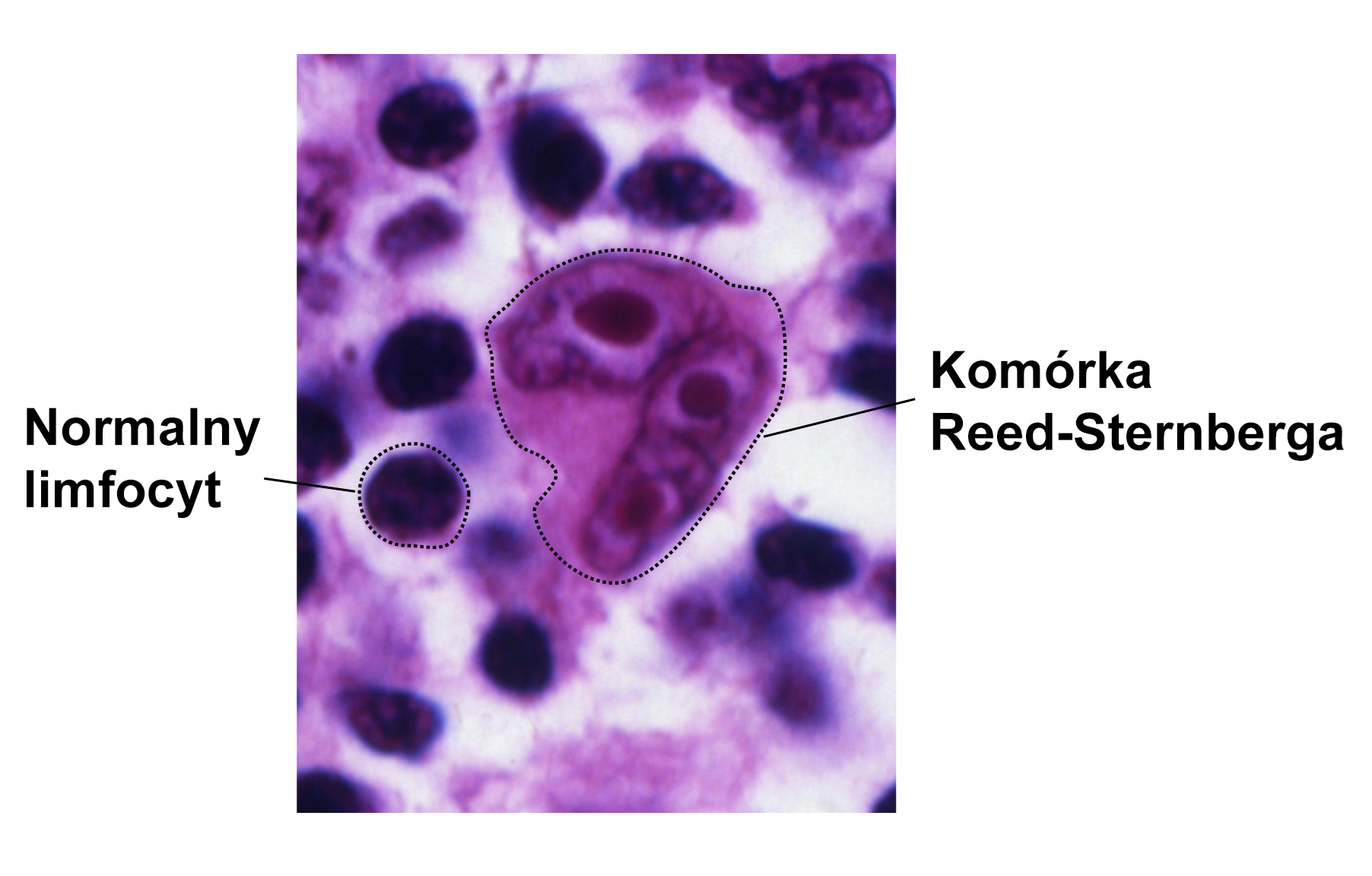 Komórka Reeda-Sternberga; zdjęcie pokazuje normalne limfocyty w porównaniu z komórką Reeda-Sternberga, które są dużymi, nieprawidłowymi limfocytami, mogącymi zawierać więcej niż jedno jądro. Komórki te znajdują się w chłoniaku Hodgkina.